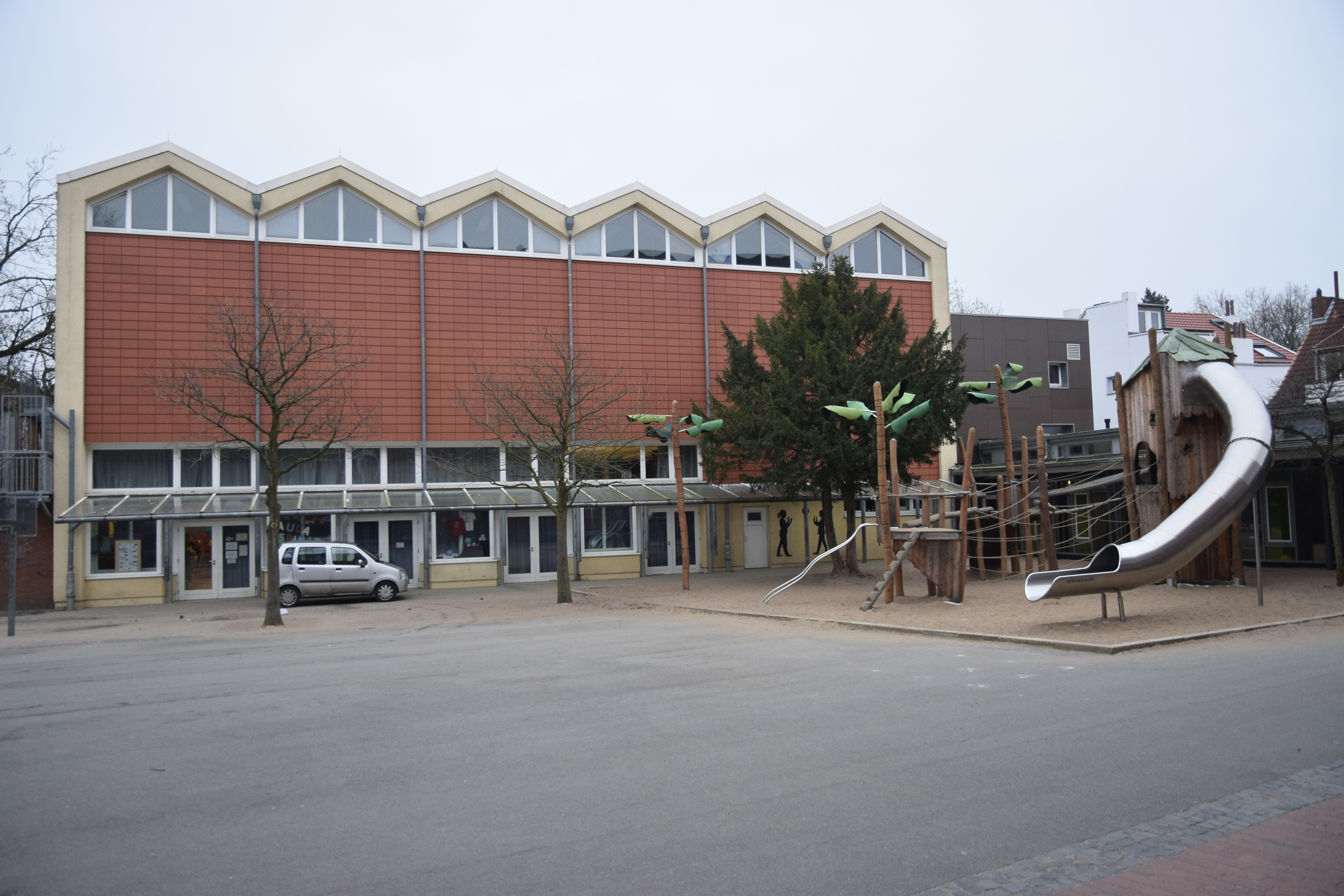 Aula und Turnhalle mit großem Schulhof und Spiellandschaft